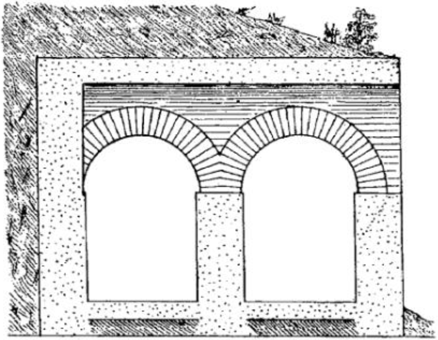 Chambre d'aboutissement des galeries jumelles de l'aqueduc romain de Miribel.